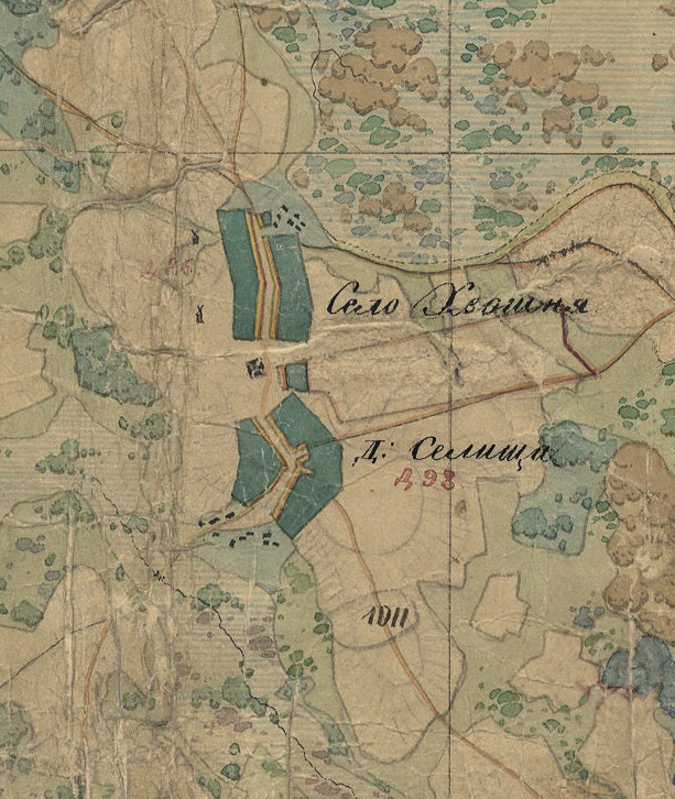 Селище-Хвошня на карте Менде. 1853 г.